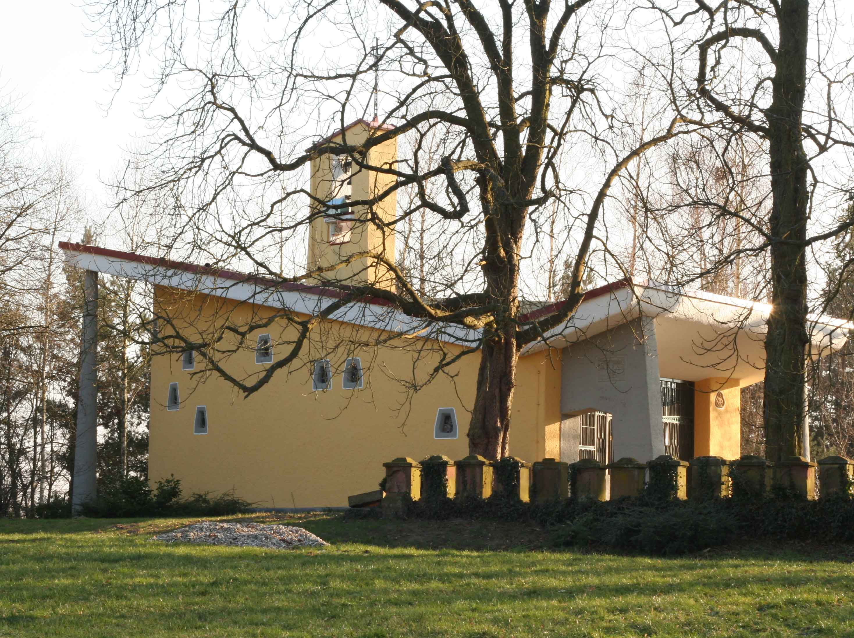 Dieterskirchel bei Rülzheim. Todes- und erster Begräbnisort des Hl. Theodard